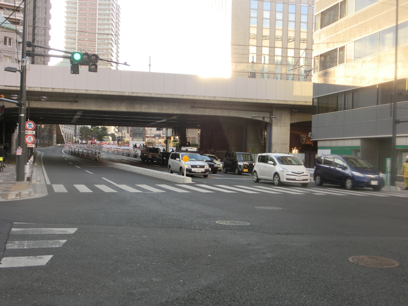 浦和駅南側で東北本線と交差する。ここから前地3丁目までが4車線で供用されている